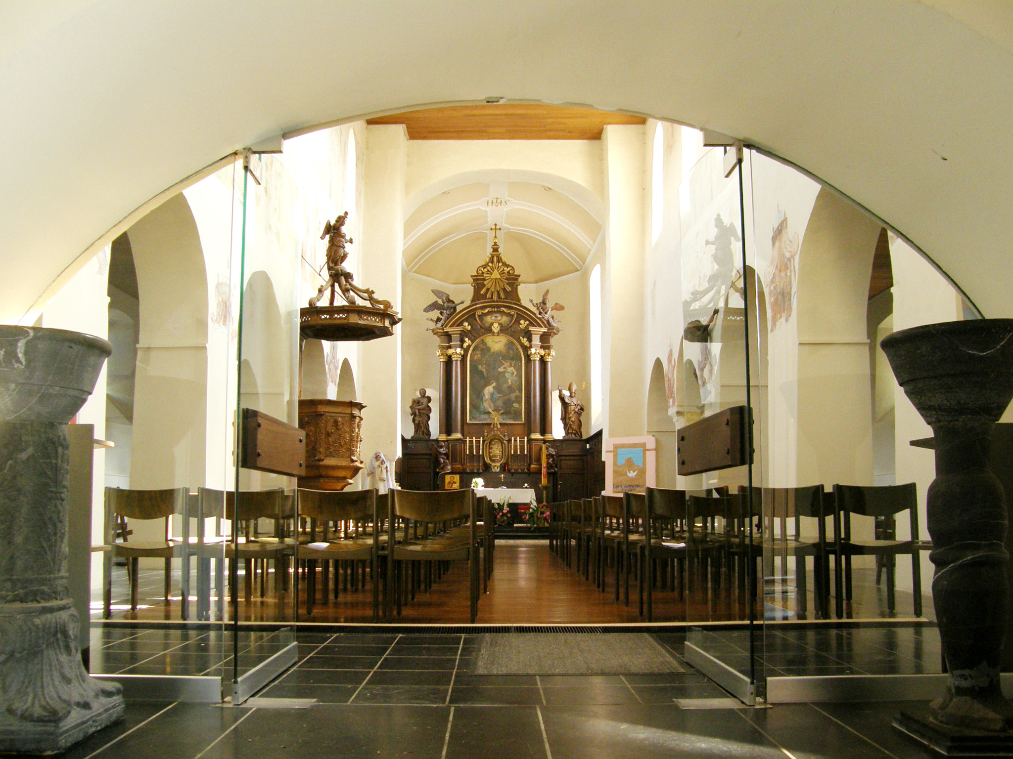 Tohogne - Intérieur de l'église romane Saint-Martin.